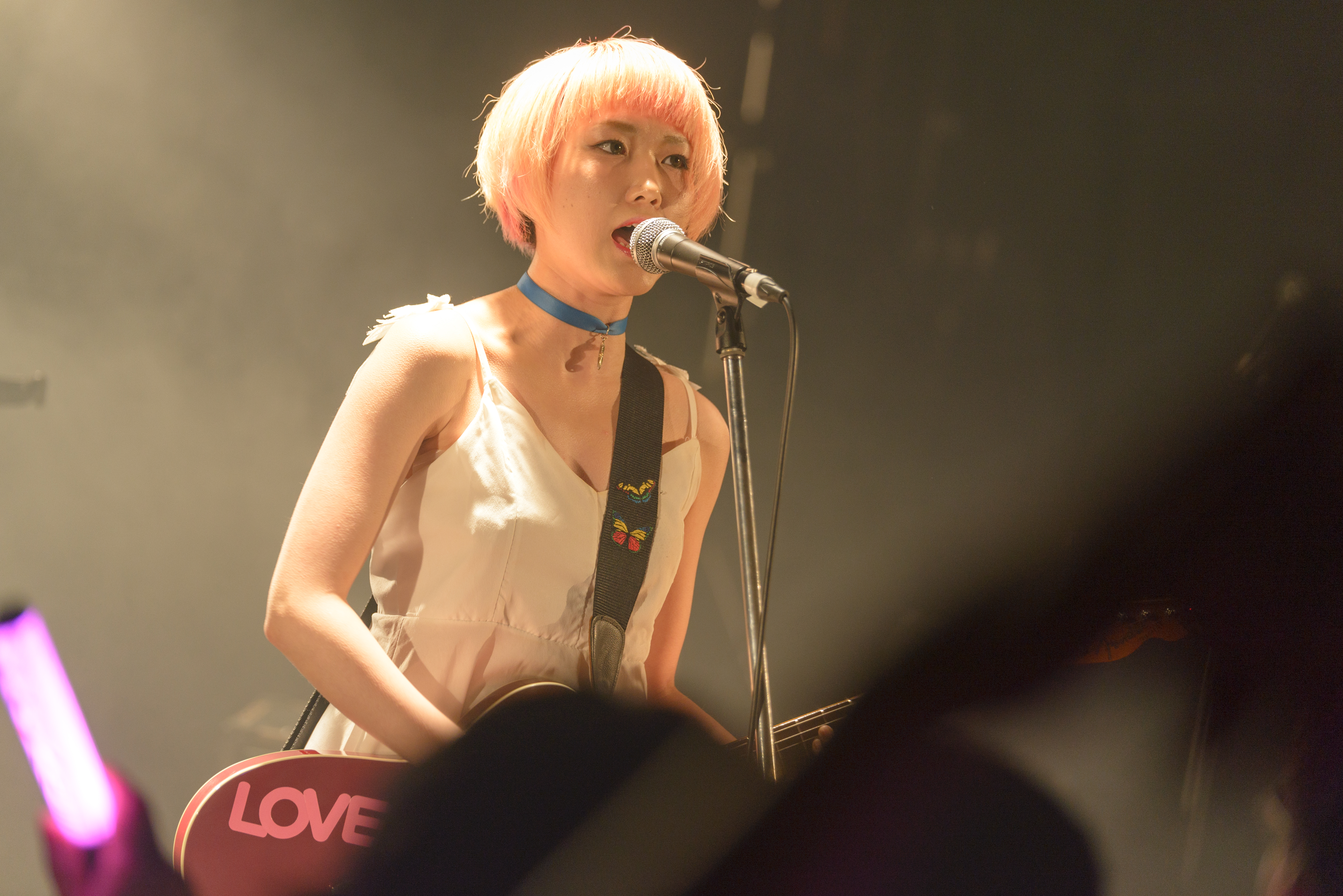 大木ハルミ「地下鉄に乗るっ」アニメ上映イベント